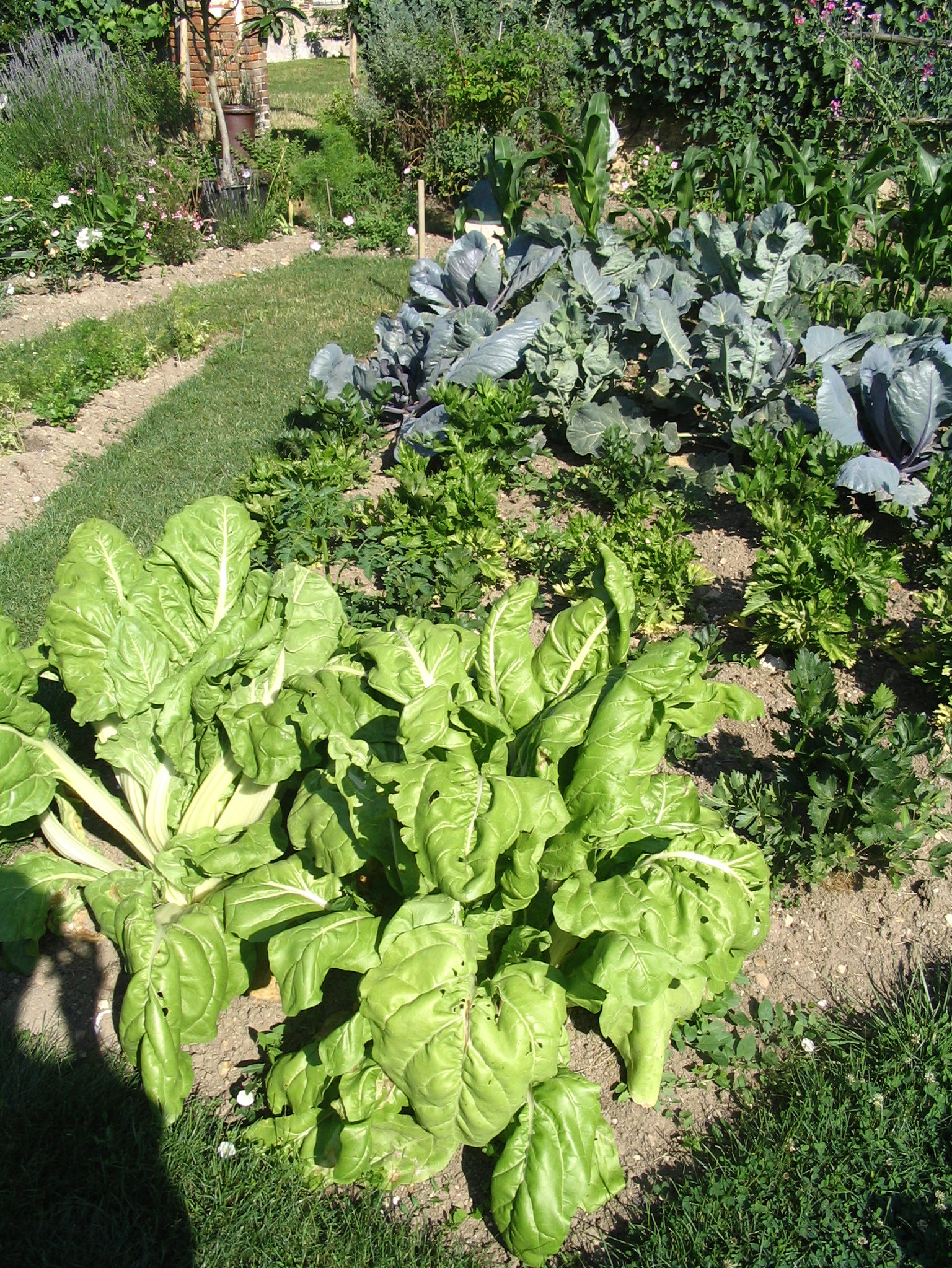 Jardin du presbytère de La Ferté Loupière, Yonne